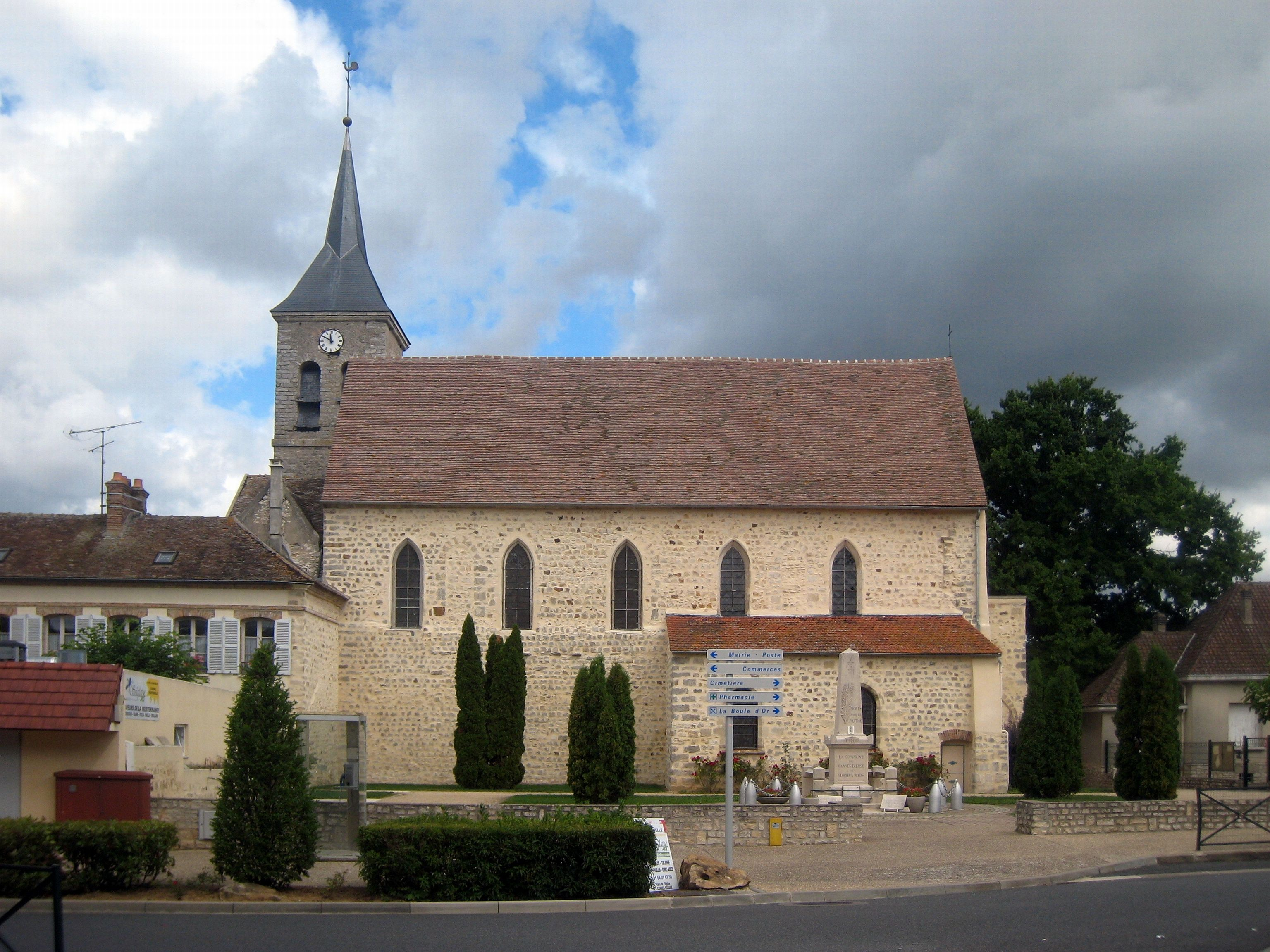 L'Eglise de Cannes-Ecluse (Seine et Marne)